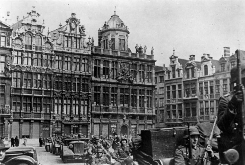 Deutsche Truppen ziehen in Brüssel ein.